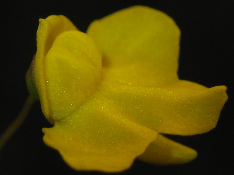 Utricularia subulata's flower.